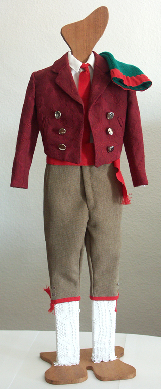 Jaqueta e calção. As jaquetas, usadas pelos forcados nas lides tauromáquicas, são acolchoadas, para proteger o tórax das investidas do animal. Acompanha com camisa branca, faixa vermelha, barrete verde com banda vermelha e meia rendada branca até ao joelho.